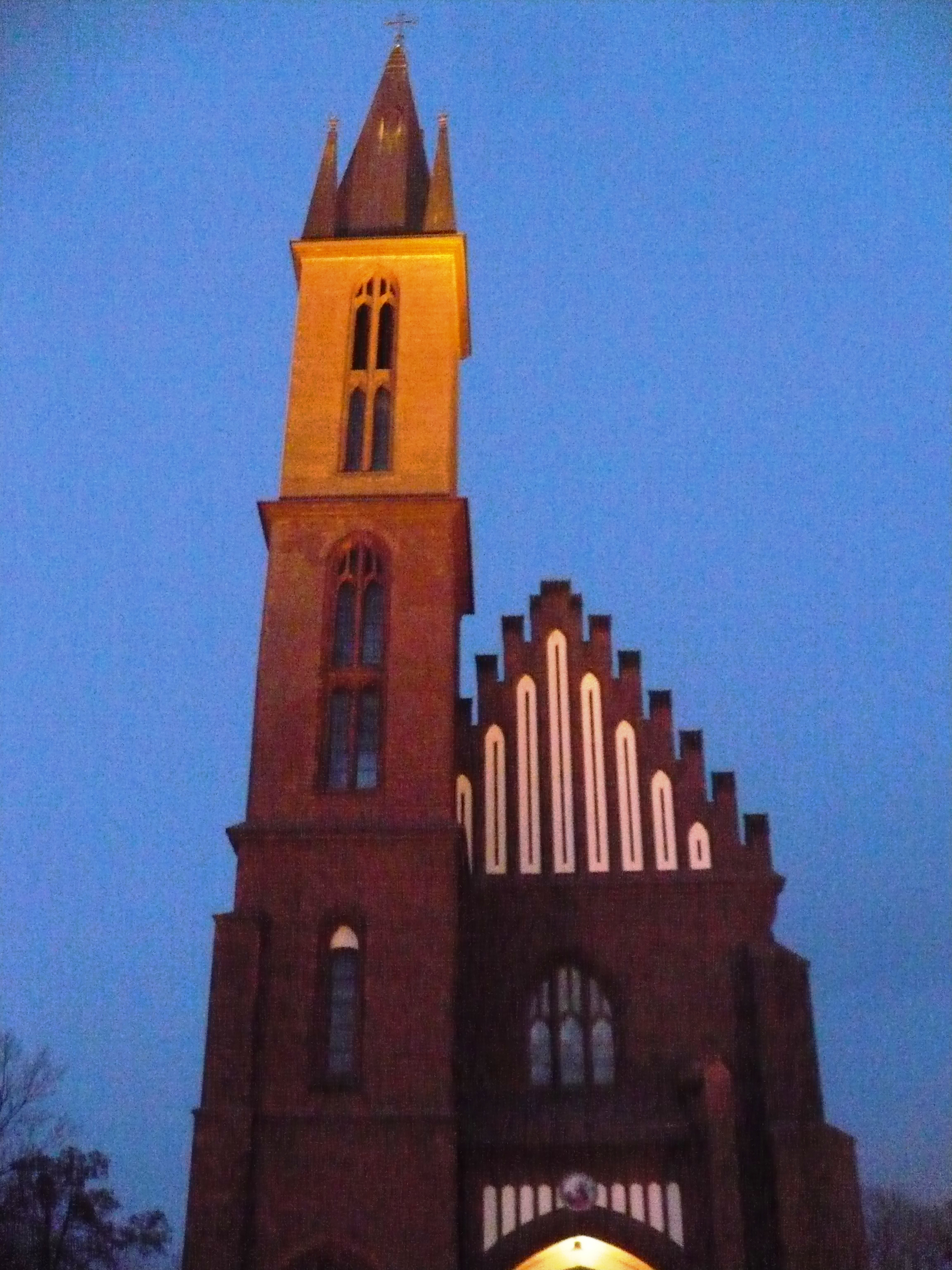 Kościoł pw. Świętego Stanisława w Myszkowie nocą